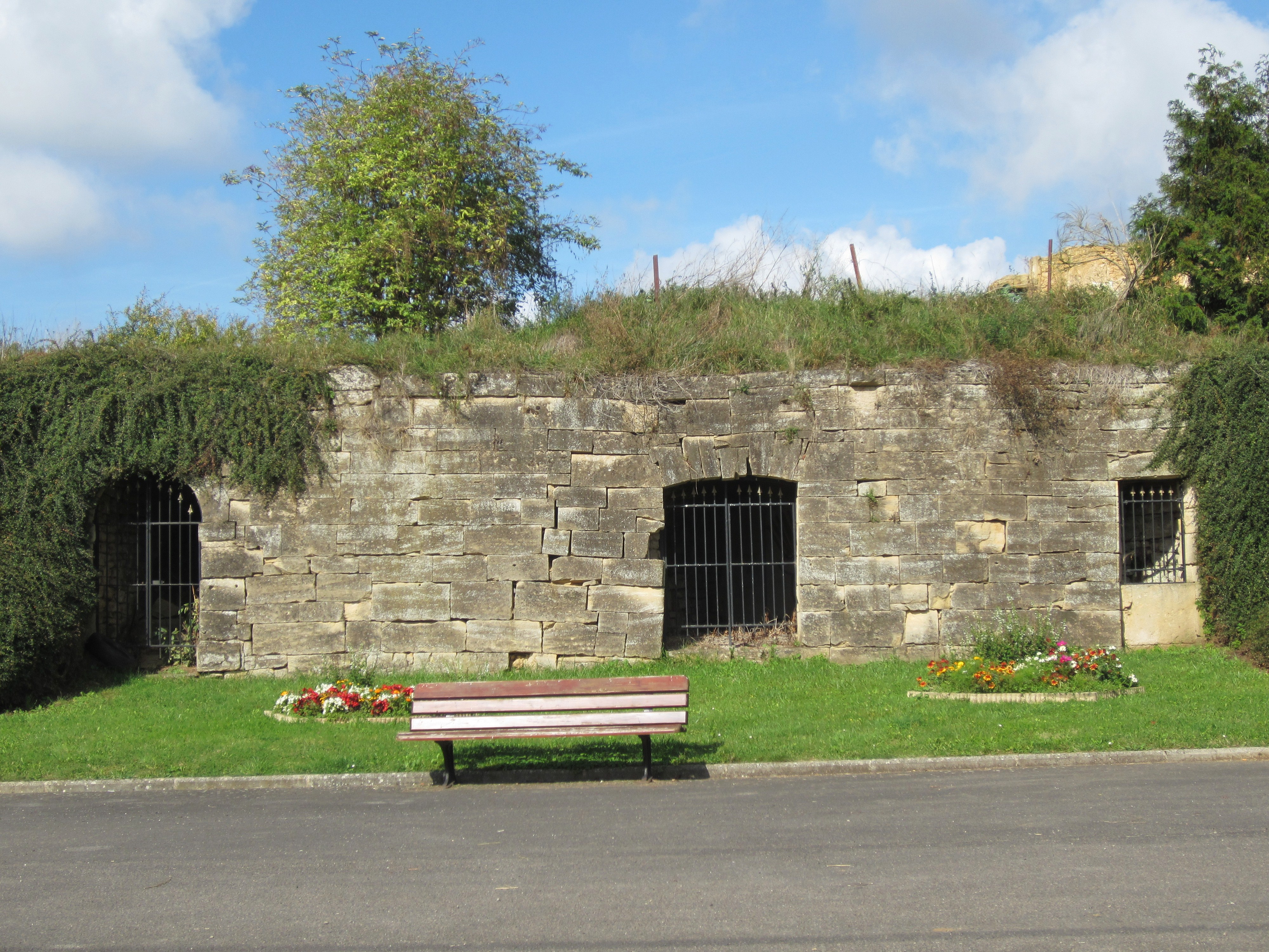 Description souterrain chateau Preutin souterrain chateau Preutin